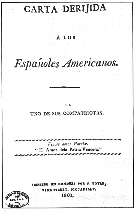 Portada de la primera edición en castellano de la “Carta a los españoles americanos” del jesuita peruan Juan Pablo Viscardo y Guzmán (1801).